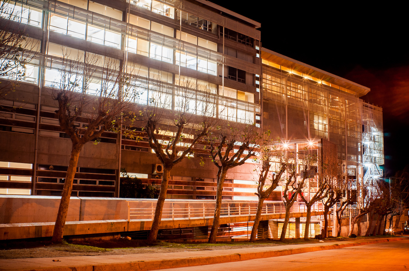 Ingenieria UPLA